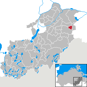 Voigtsdorf in Mecklenburg-Vorpommern, Landkreis Mecklenburg-Strelitz